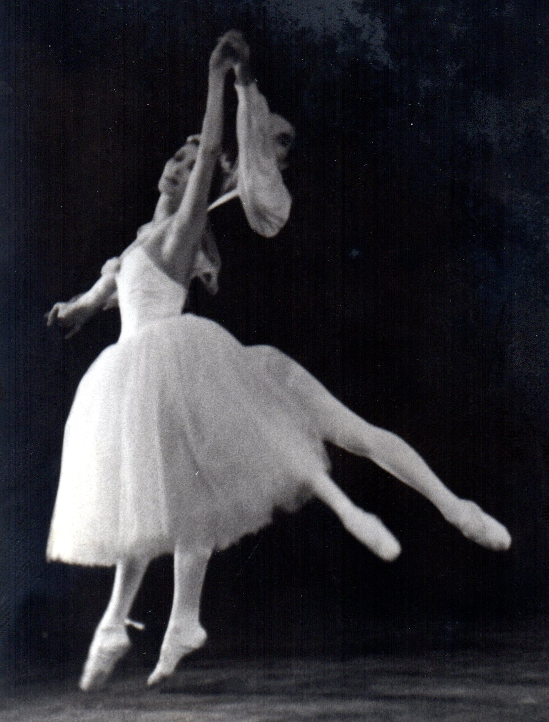 Les Sylphides